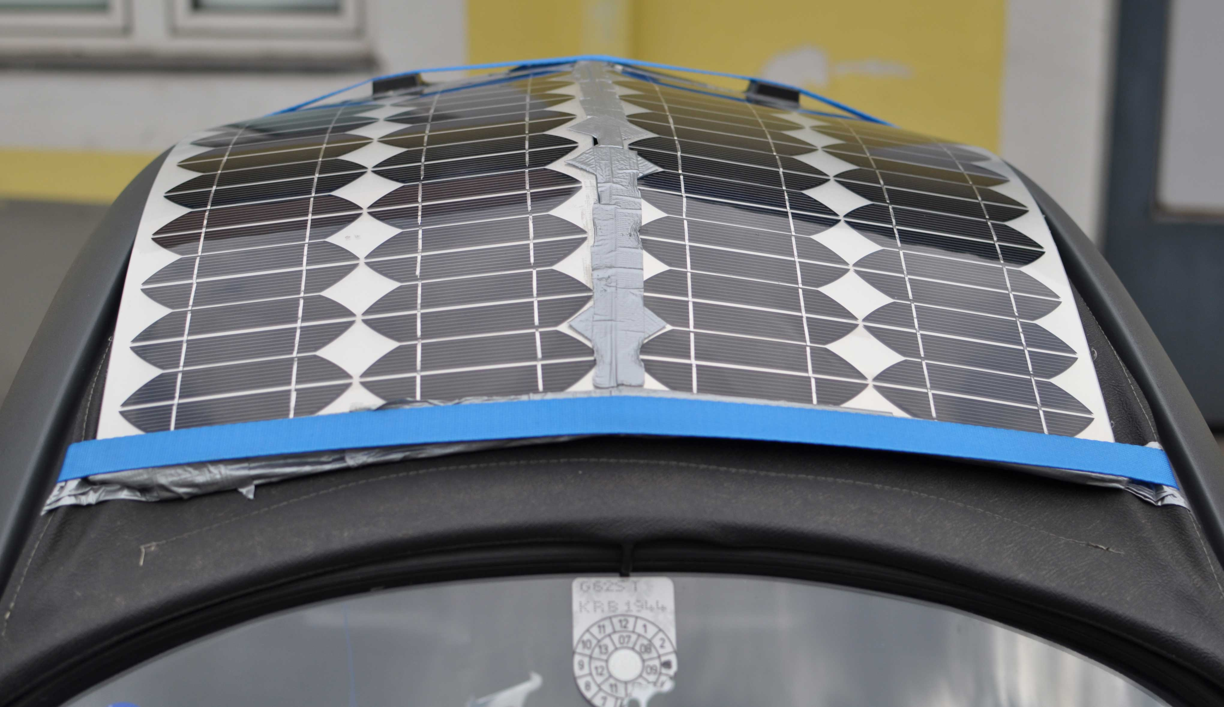 Semiflexible monokristalline Solarzelle auf Autodach Microcar.